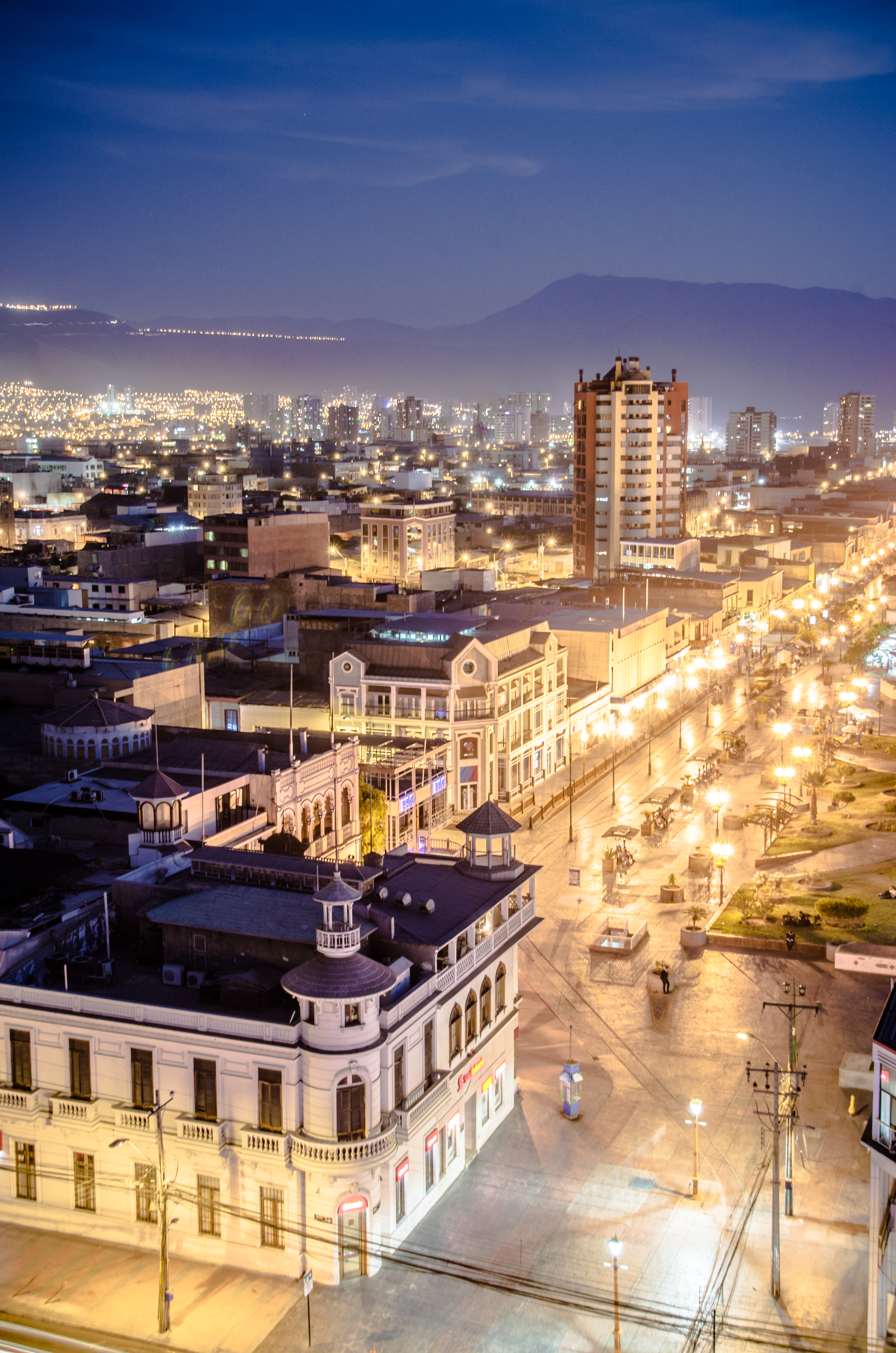 Calle Baquedano y Plaza Arturo Prat This is a photo of a national monument in Chile: 527